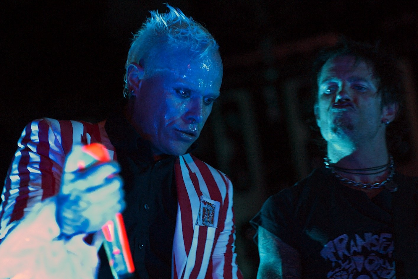 Кийт Флинт с настоящия китарист Роб Холидей.